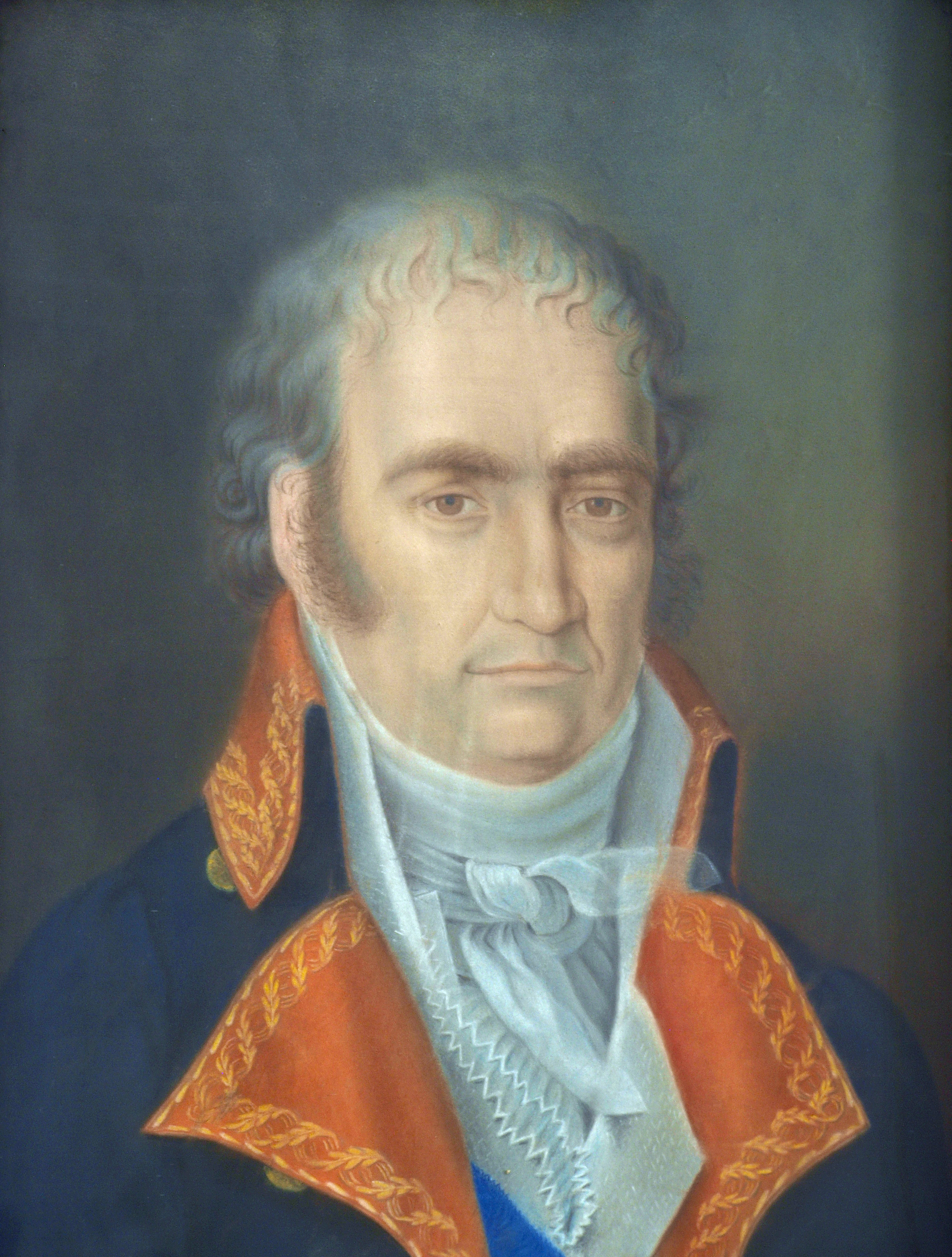 Tomás de Morla y Pacheco un ingeniero militar que hizo notables aportaciones al desarrollo y difusión de las técnicas metalúrgicas y de las estrategias militares de su época.